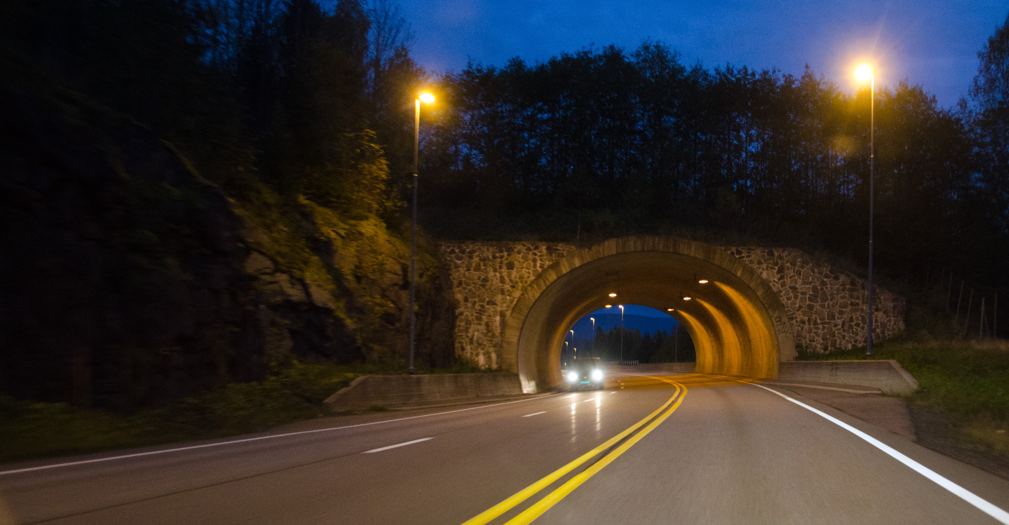 Hillestad miljøtunnel, Holmestrand